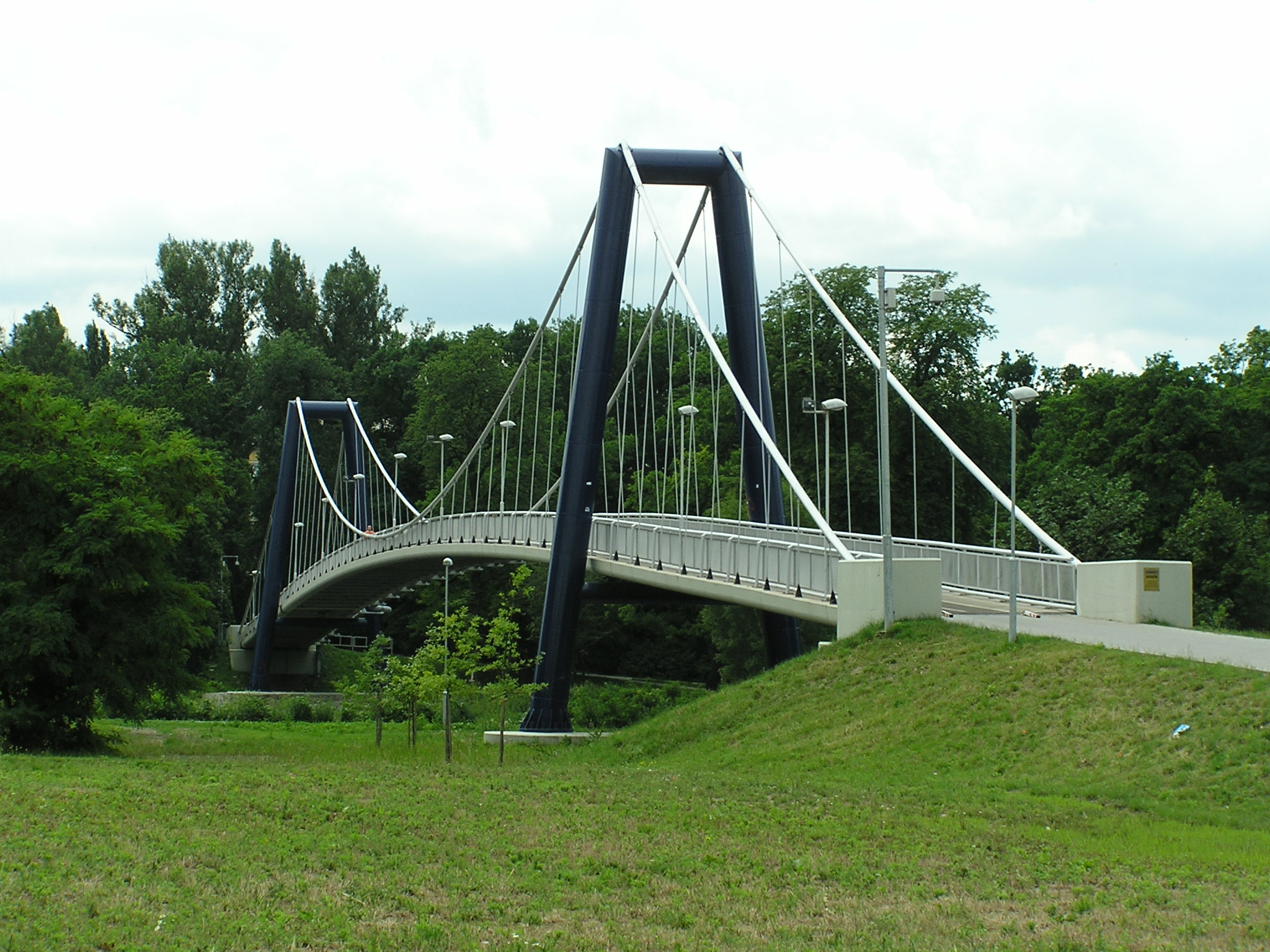 Lávka přes Labe v Kolíně